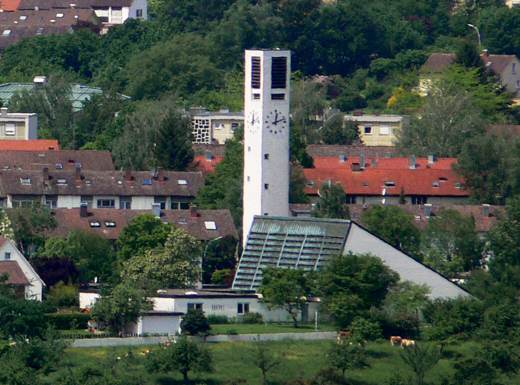 Ravensburg, Weststadt, Evangelische Johanneskirche, erbaut 1962–1963, Architekt: Peter Wurm